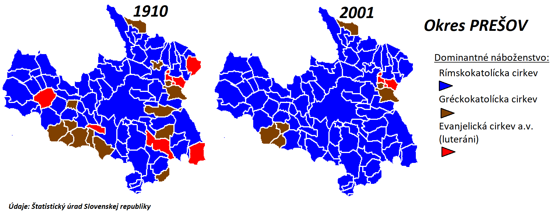 Dominantné náboženstvá v obciach okresu Prešov podľa sčítania v roku 1910 a 2001.